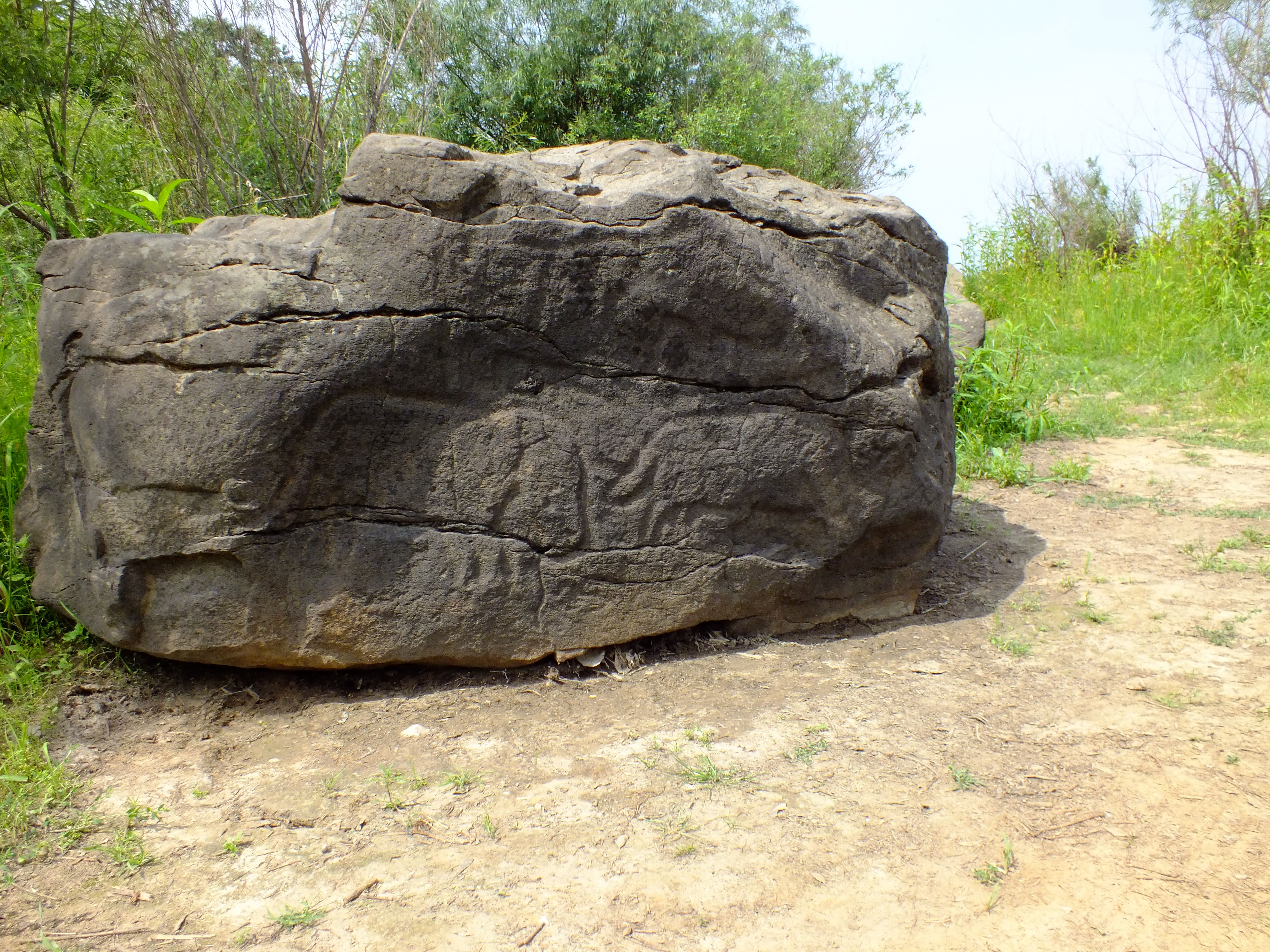 Petroglif of Sikachi-Alyan